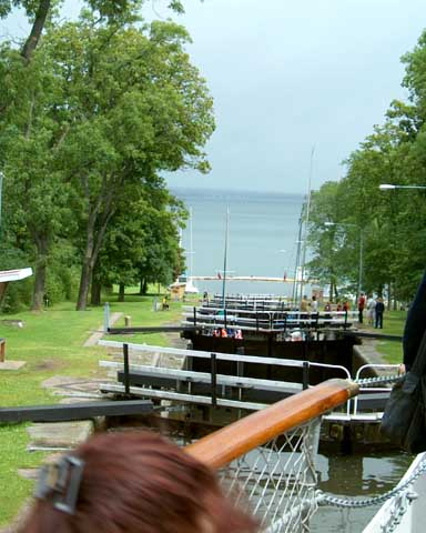 Sur le canal Göta (Suède), écluses de Motala (88,5 m) au lac Boren (73,2 m)